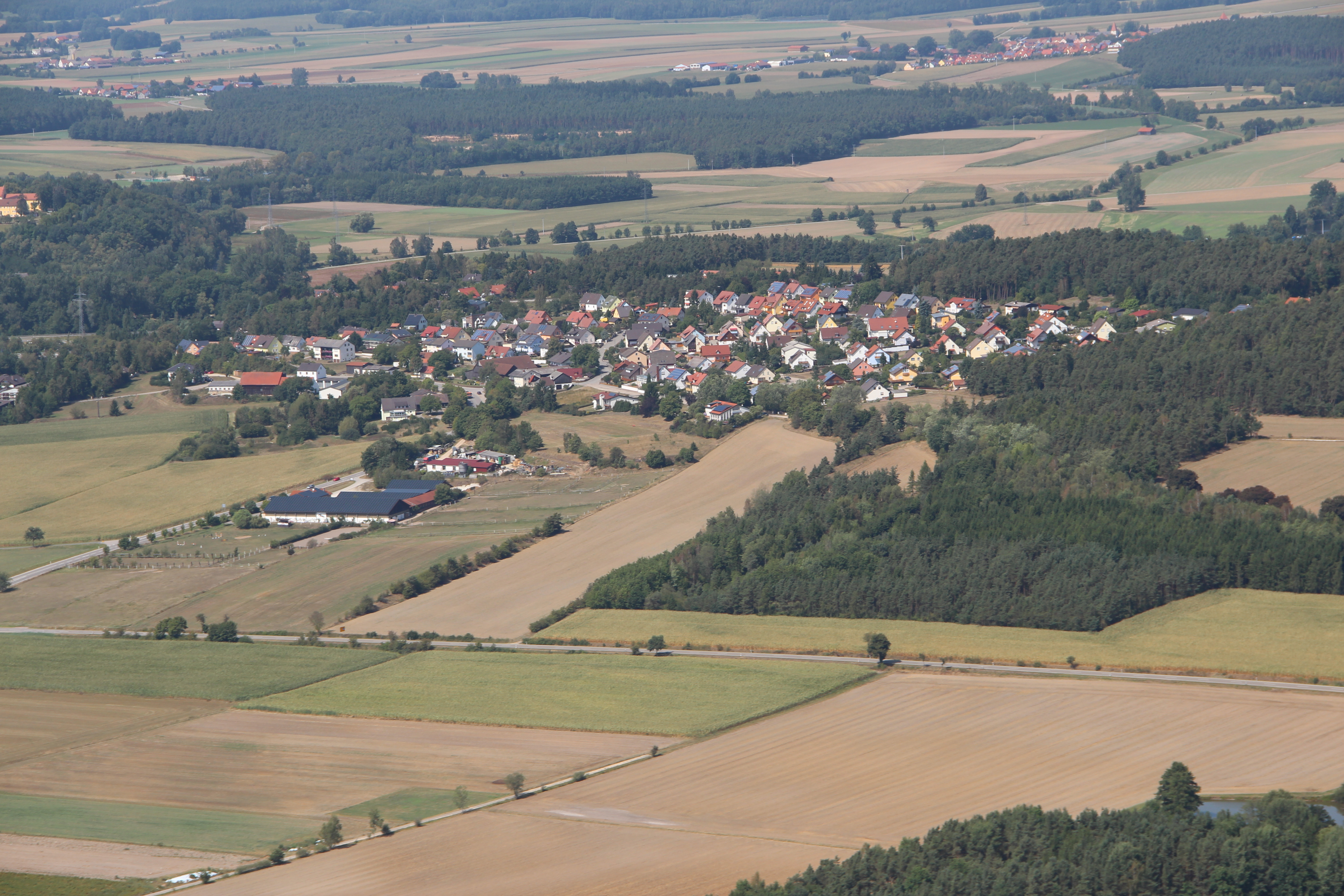 Traunricht, ein Ortsteil von Schwarzenfeld,Landkreis Schwandorf, Oberpfalz, Bayerm (2012)